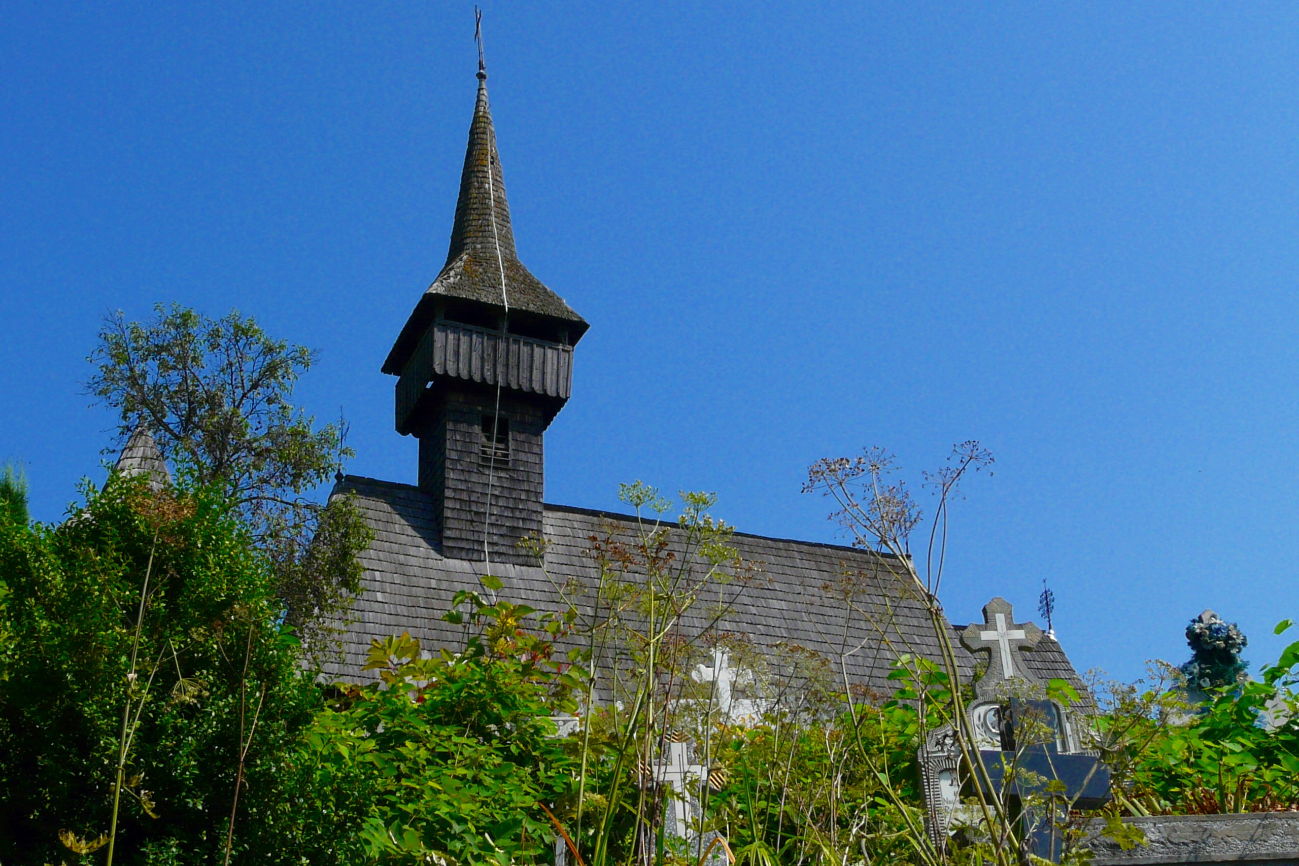 Une des deux églises en bois de Săliştea de Sus